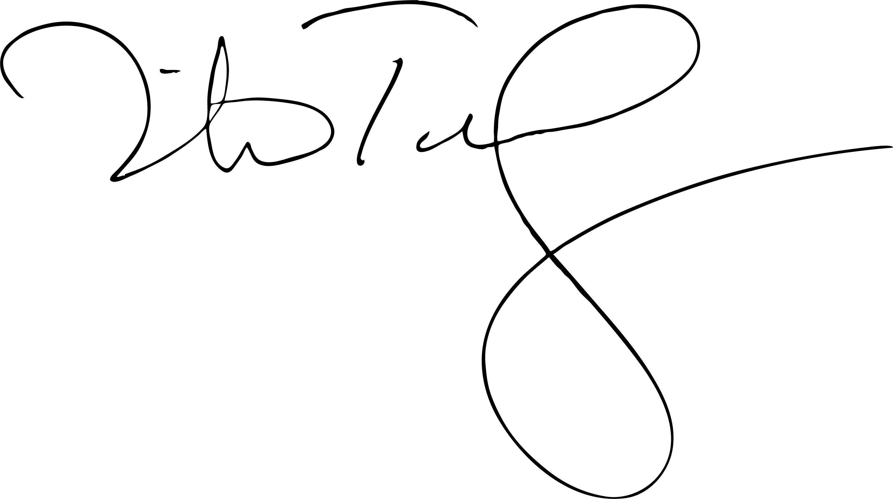 Autographe de l'auteur Michel Tremblay obtenue lors du Salon du livre de Montréal 2017.